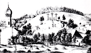 Aiterbach mit Kalvarienberg (Lithografie 1846) Urheberrecht ausgelaufen